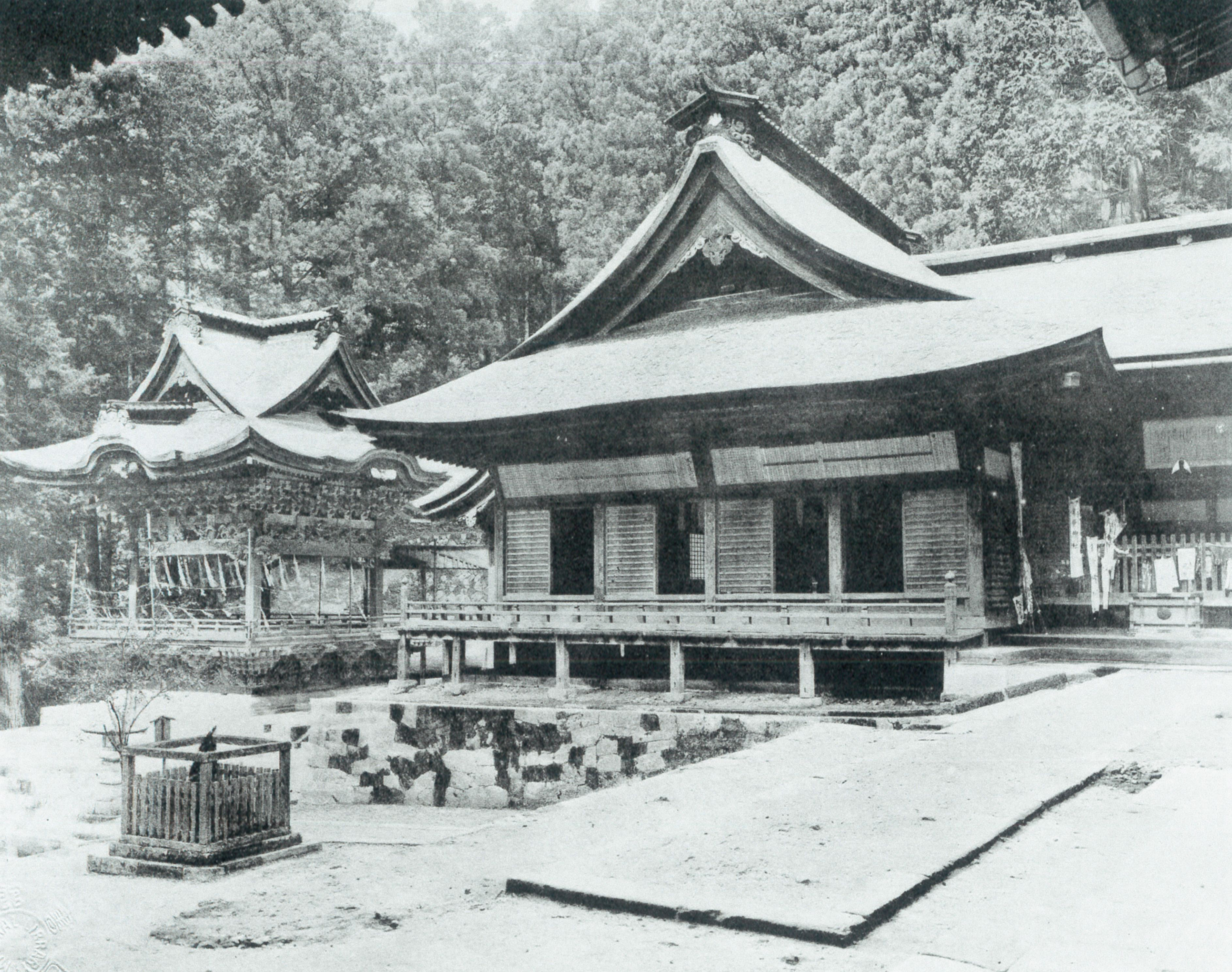 御嶽山金櫻神社